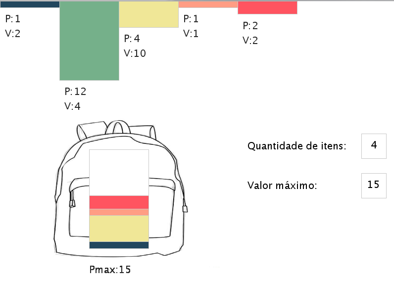 Problema da Mochila feito no Processing.